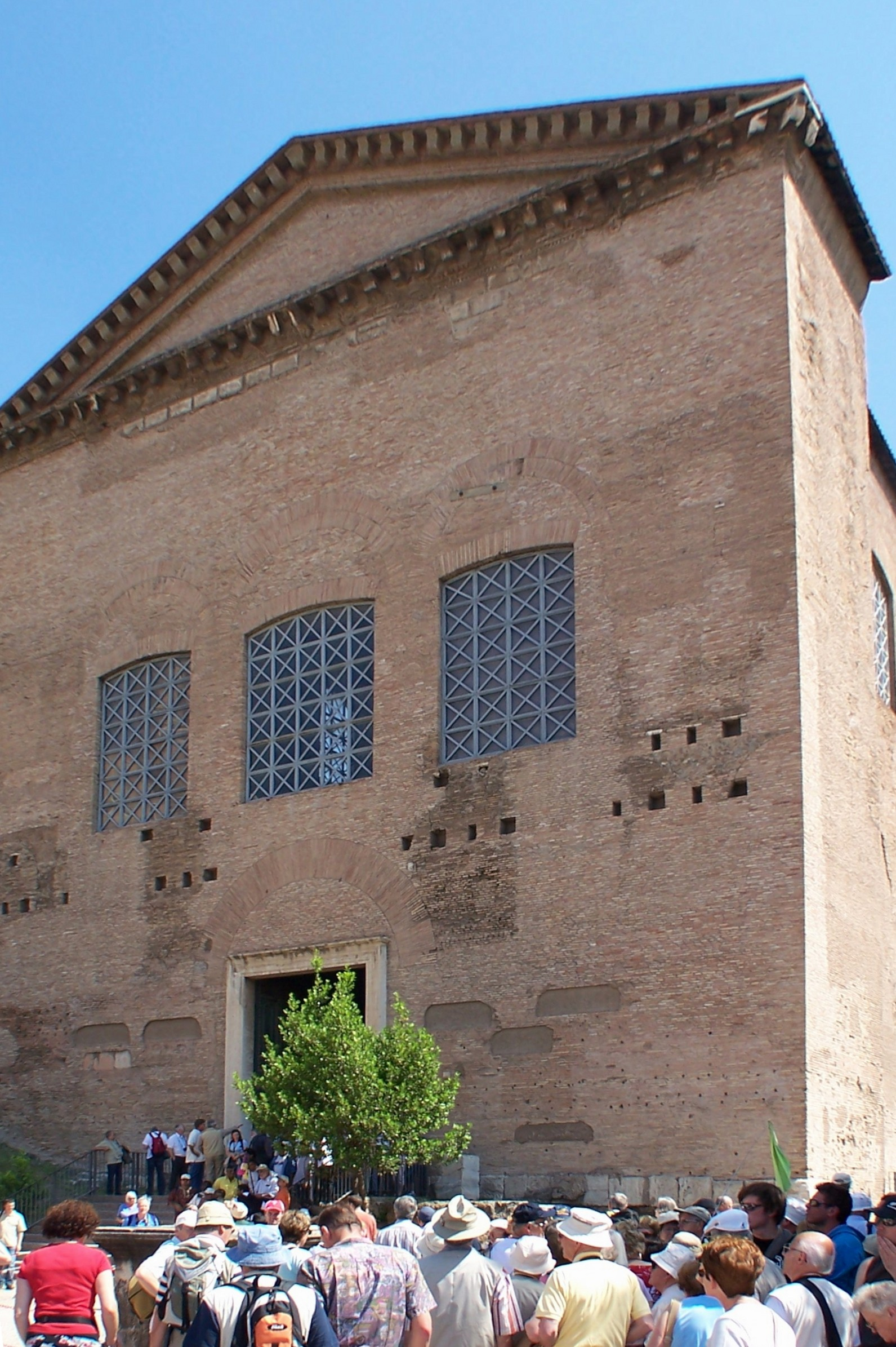 Forum Romanum, Curia Iulia